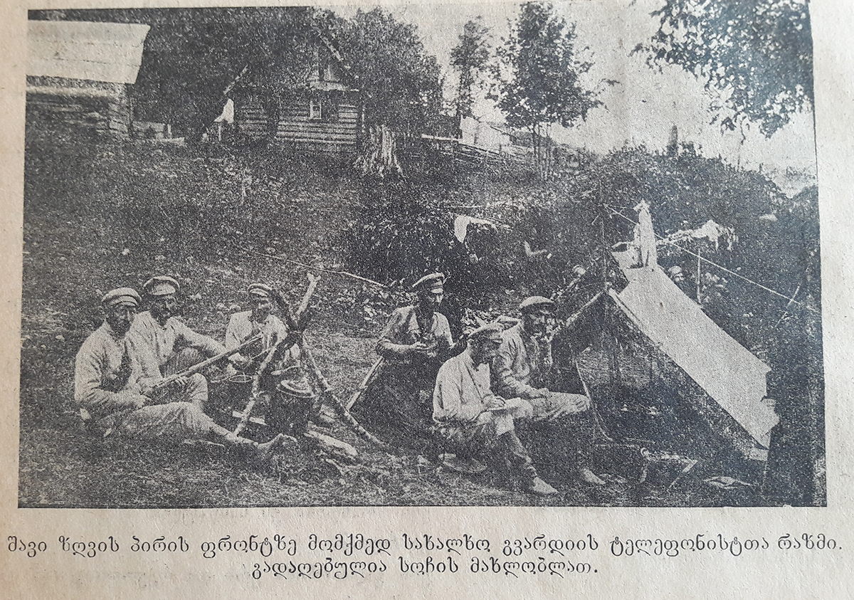 სახალხო გვარდიის ტელეფონისტთა რაზმი სოჭის რაიონში. 1919 წ.